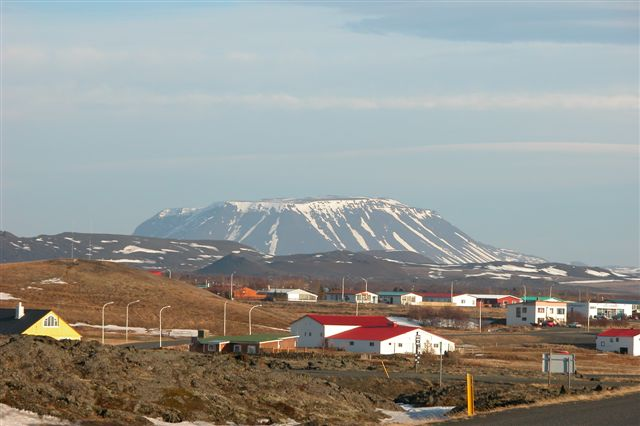 Reykjahlíð